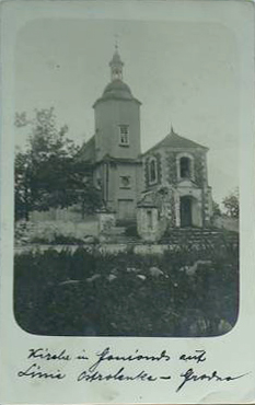 Беларуская (тарашкевіца): Гонядзь (Goniadź). Касьцёл Сьвятой Агнешкі з званіцай, складзенай з бутавага каменю, уласьцівага тагачаснаму беларускаму сакральнаму мастацтву